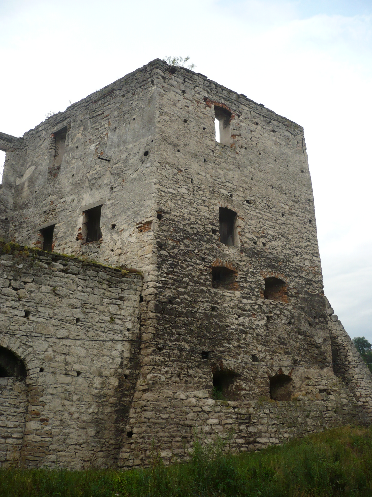 Czortków. Zamek